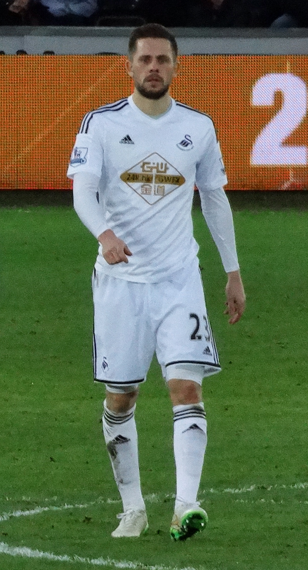 Sigurdsson